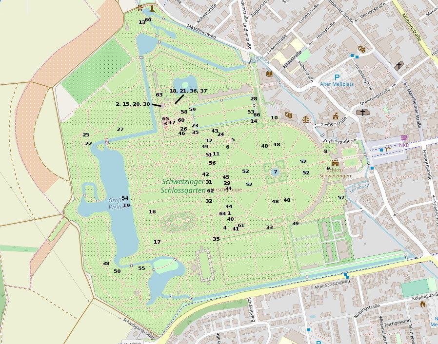 Karte der barocken Skulpturen und Brunnen im Schlossgarten Schwetzingen This map may be incomplete, and may contain errors. Don't rely solely on it for navigation.